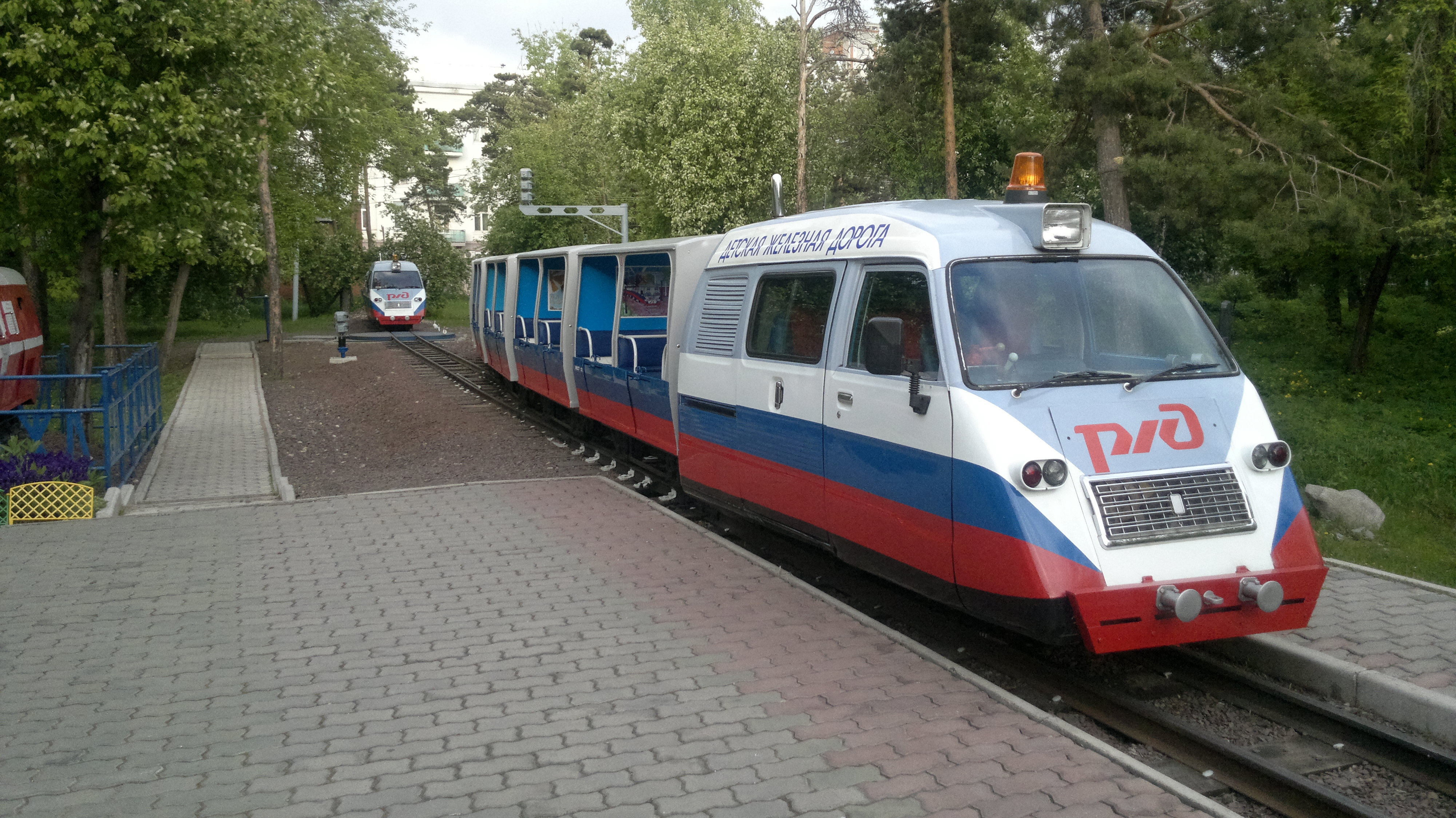 Мотовоз Красноярской детской железной дороги